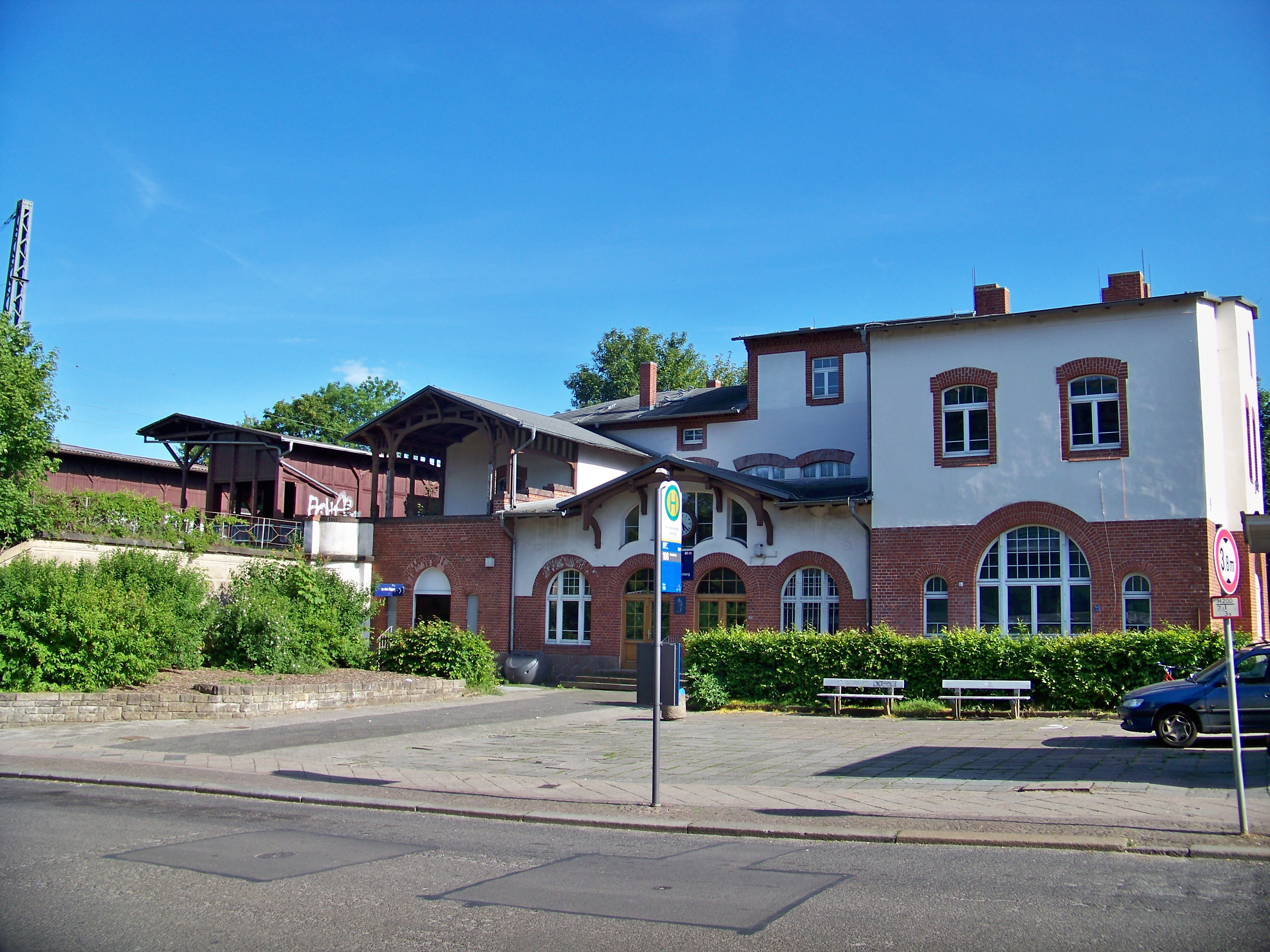 Bahnhof Markkleeberg - Empfangsgebäude